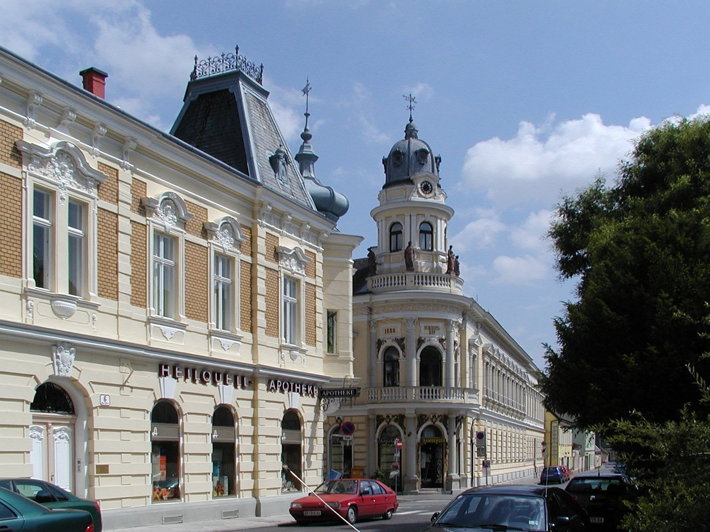 Baden bei Wien, Blick vom östlichen Pfarrplatz Richtung Annagasse/Ausmündung Antonsgasse